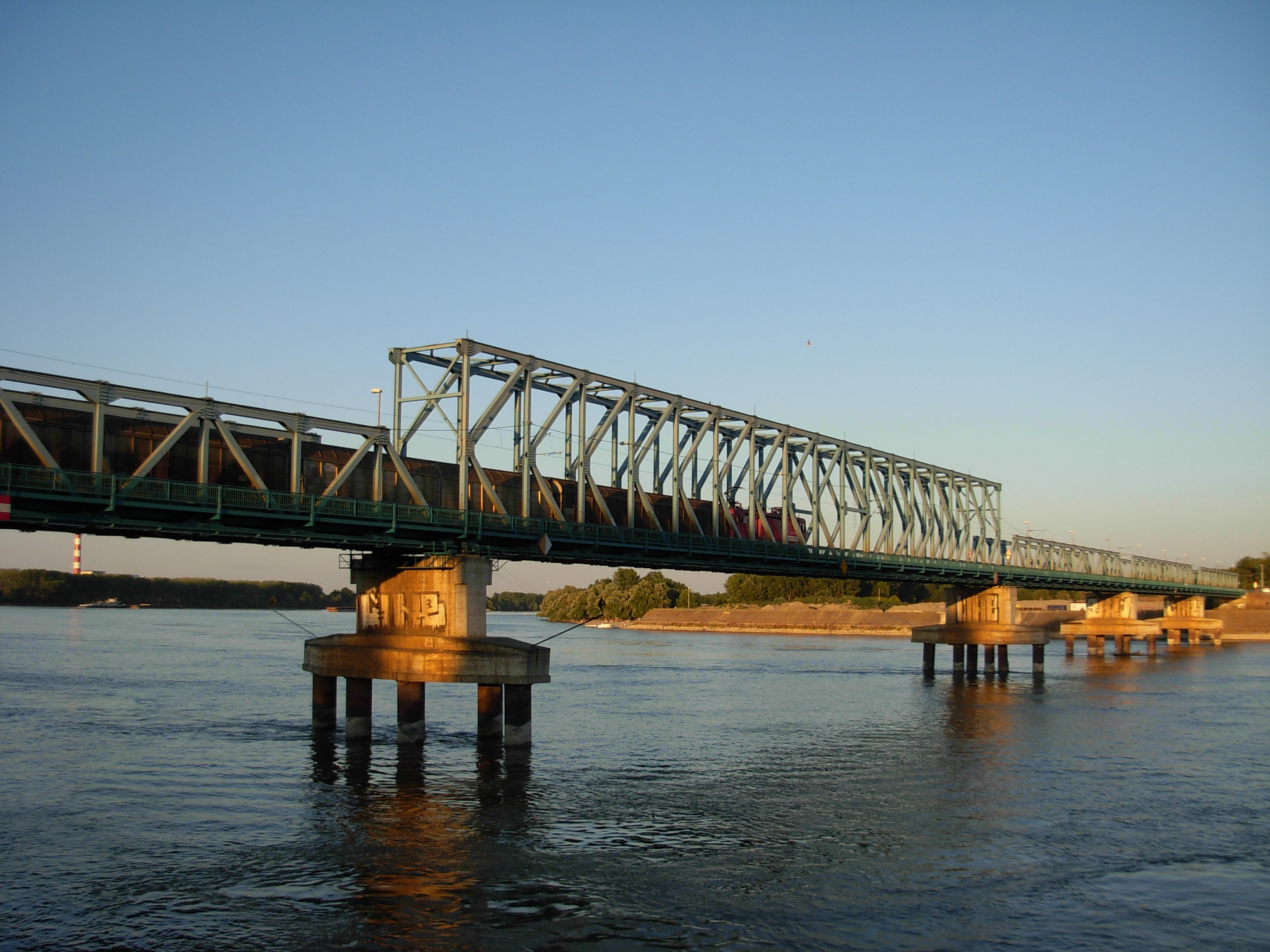 Drumsko-železnički most u Novom Sadu.